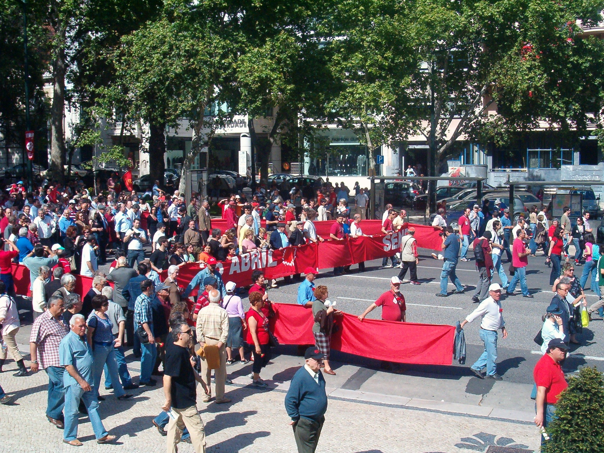 34-o Aniversário da Revolução dos Cravos, Avenida da Liberdade, Lisboa